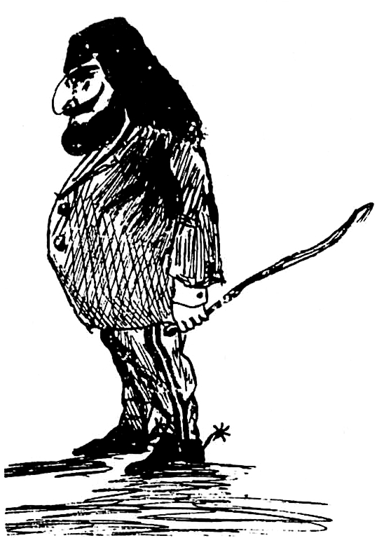 Contemp. caricature of Nicolae Vogoride